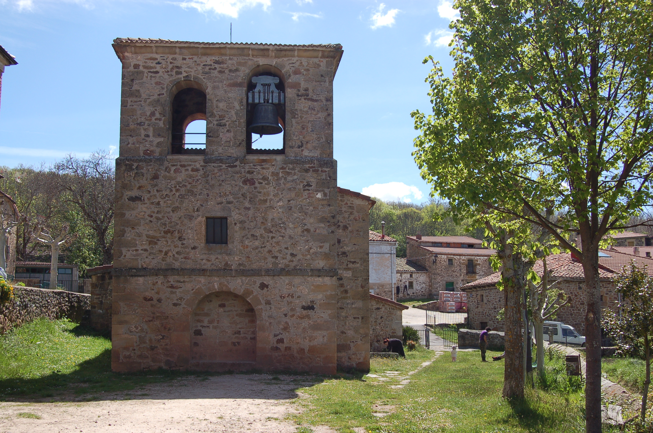 Iglesia de Monasterio de la Sierra